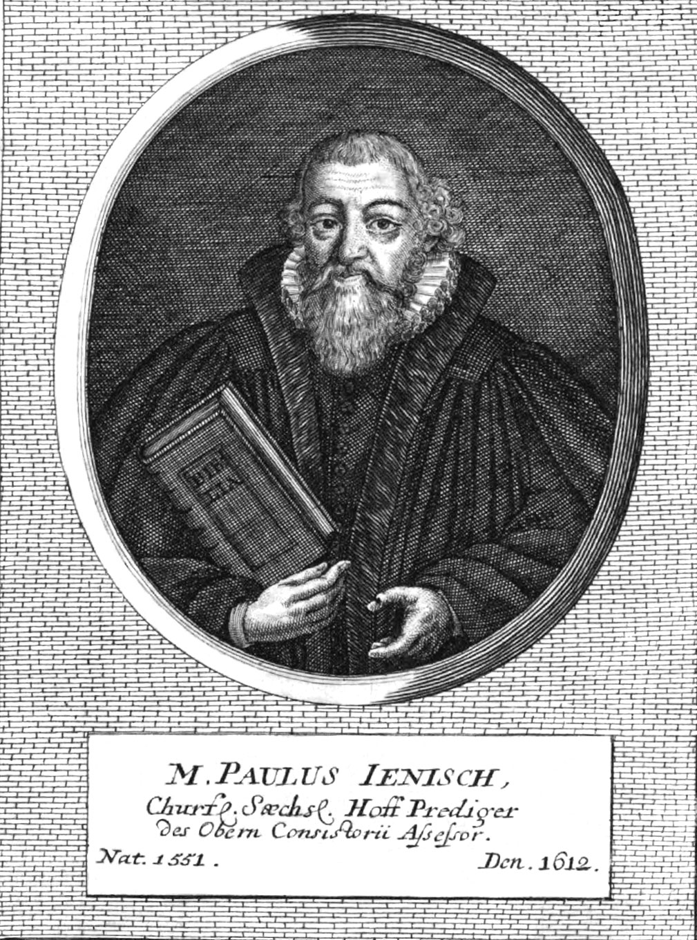 Paul Jenisch (Theologe) (1551/52-1612) deutscher lutherischer Theologe und Oberhofprediger Dresden